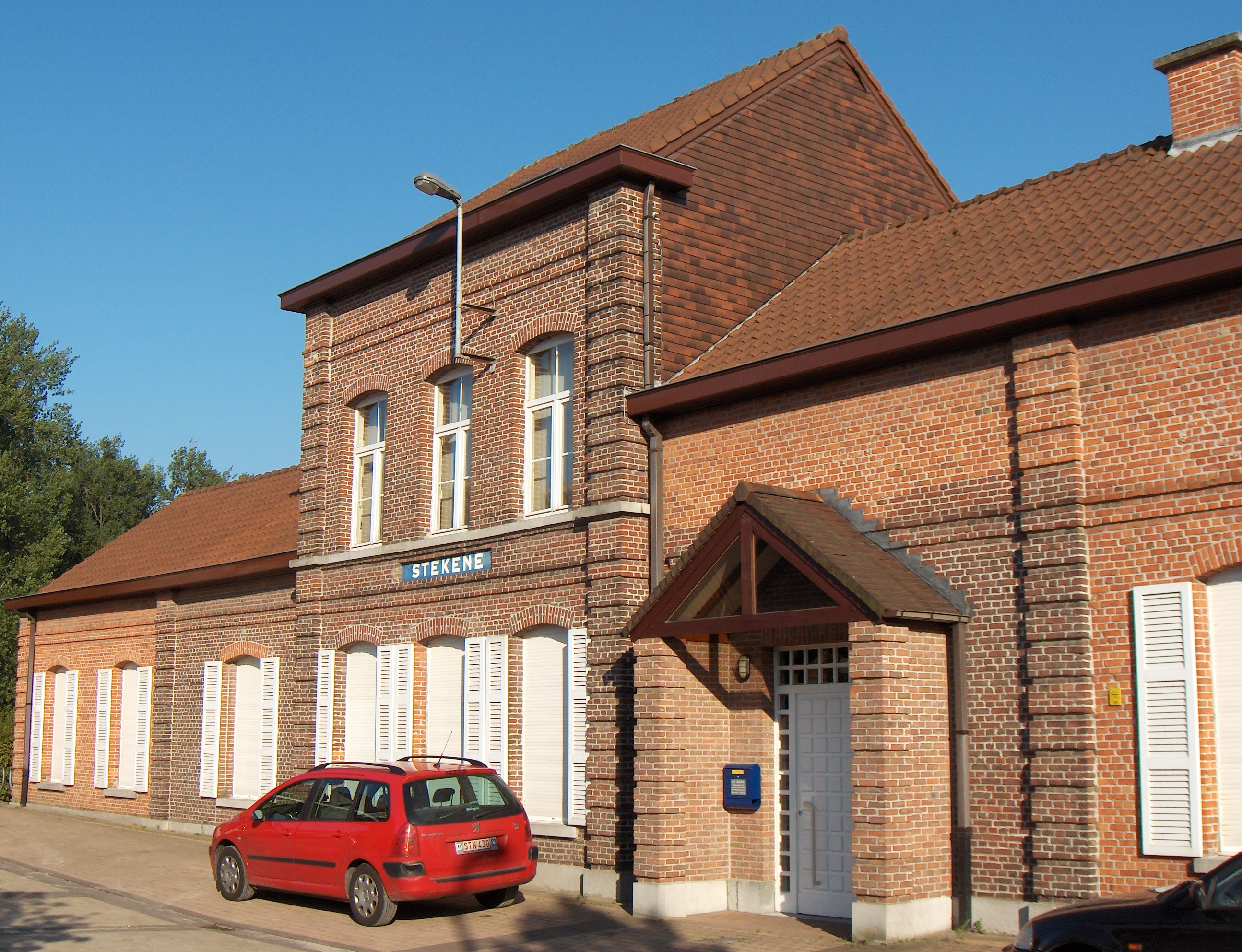 Beschreibung: Stekene (Belgien, Prov. Ostflandern), ehemaliger Bahnhof südlich der Dorfmitte; Eisenbahnlinie Sint-Gillis-Waas - Moerbeke (Ende der 50er Jahre niedergelegt). Datum: 6. August 2006 Fotograf: Friedrich Tellberg